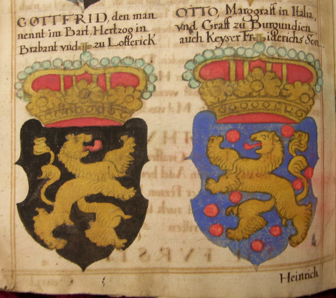 Um Zusätze vermehrte Abschrift von Sigmund Feyerabends Frankfurter Ausgabe (1578/1579) des Turnierbuchs von Georg Rüxner (Jörg Rugen), Handschrift auf Papier in zwei Bänden, 17. Jahrhundert.Detail